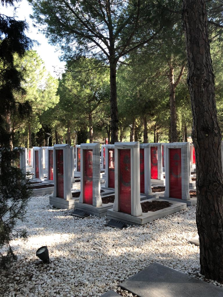 (قبور شهداء معركة جناق قلعة (حملة جاليبولي في تركيا